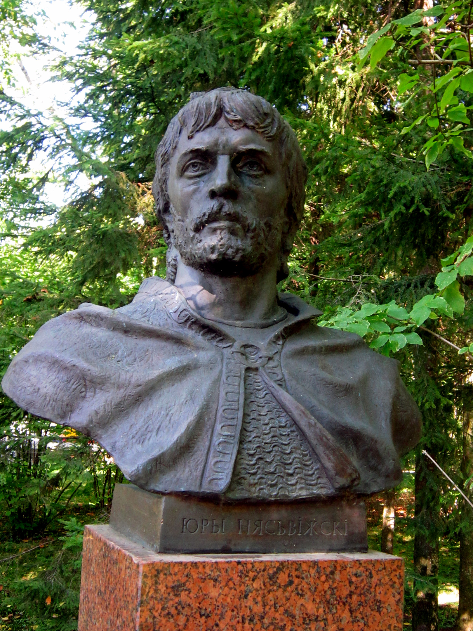 Бюст Юрия Несвижского в Старом парке Несвижского дворцово-паркового ансамбля.